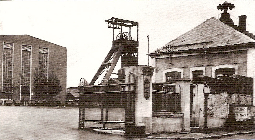 Siège 4 de Bruay